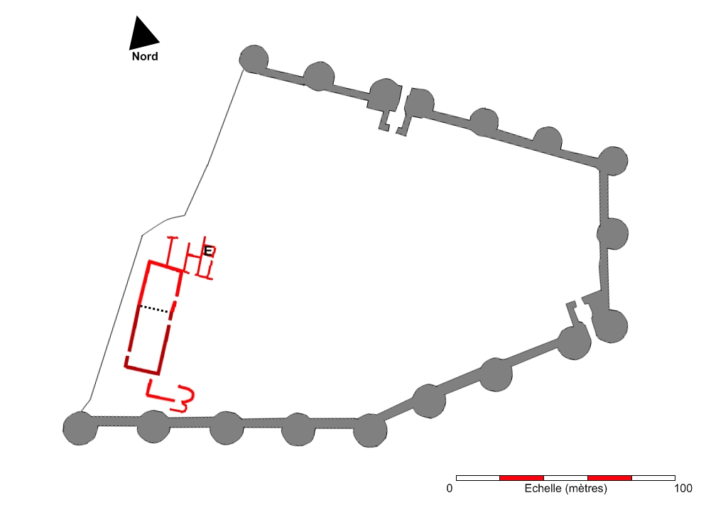 Plan des vestiges du palais comtal d'Angers. Rouge sombre : Emplacement de la Grande Salle avant agrandissement. Rouge : Emplacement des vestiges du palais comtal. E : emplacement de la pièce d'étuves retrouvée lors des fouilles de 1992-2003.